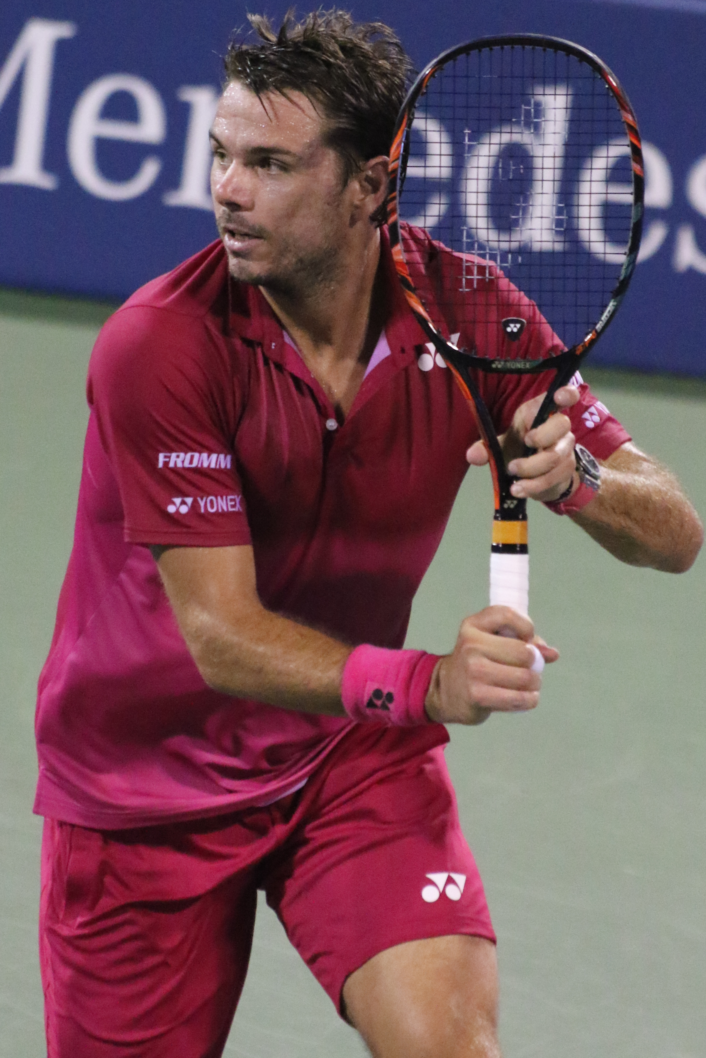 Wawrinka US16 (28)